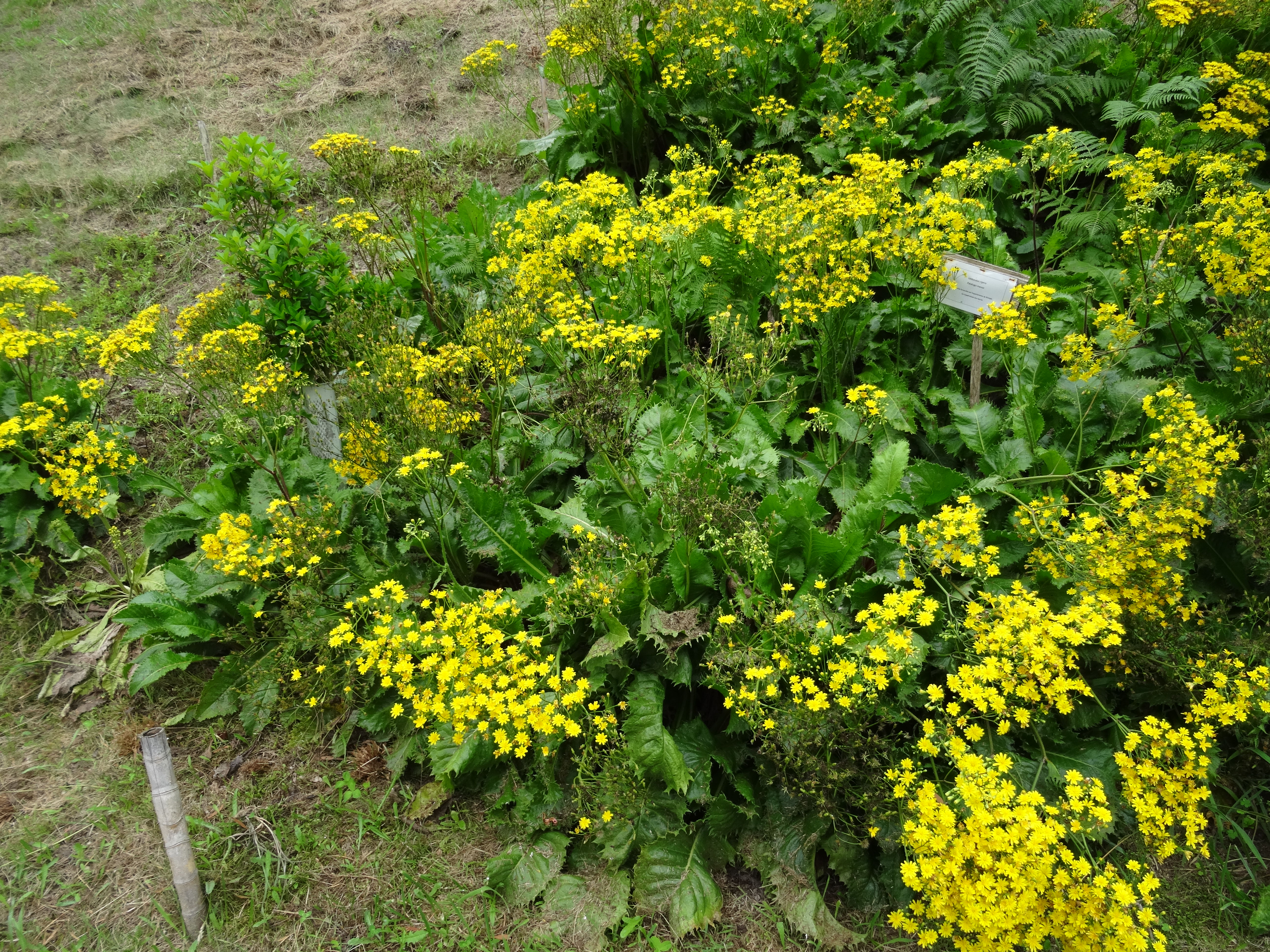 Leontodon rigens, Acores